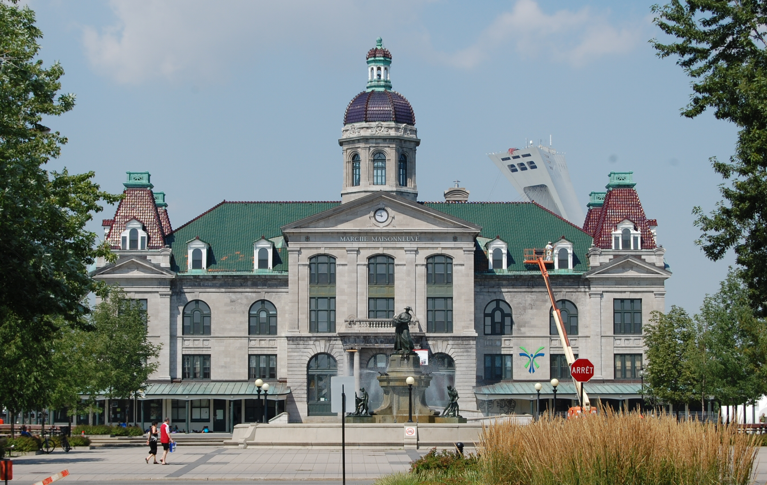 Marché Maisonneuve